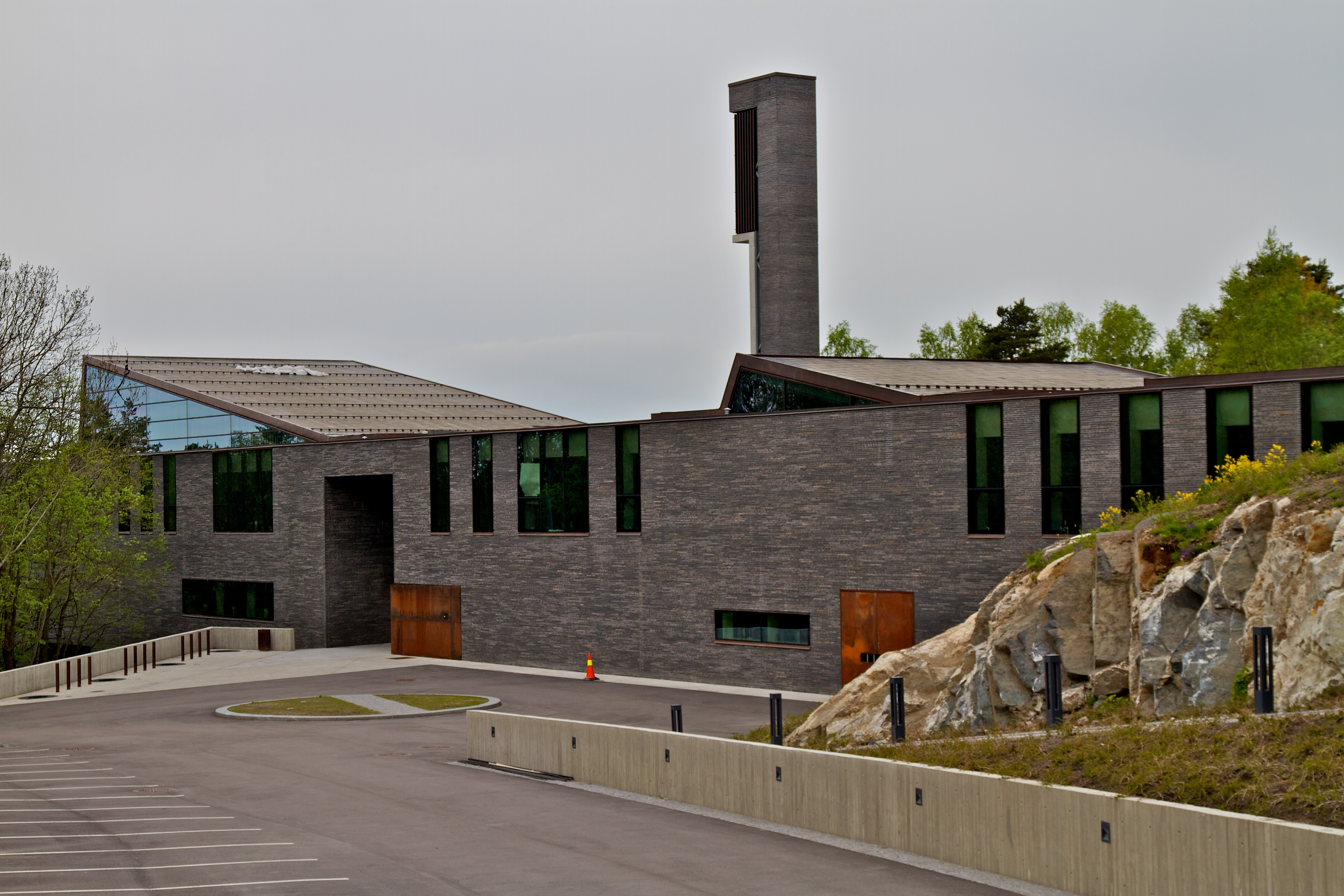 Bøler kirke i Oslo.